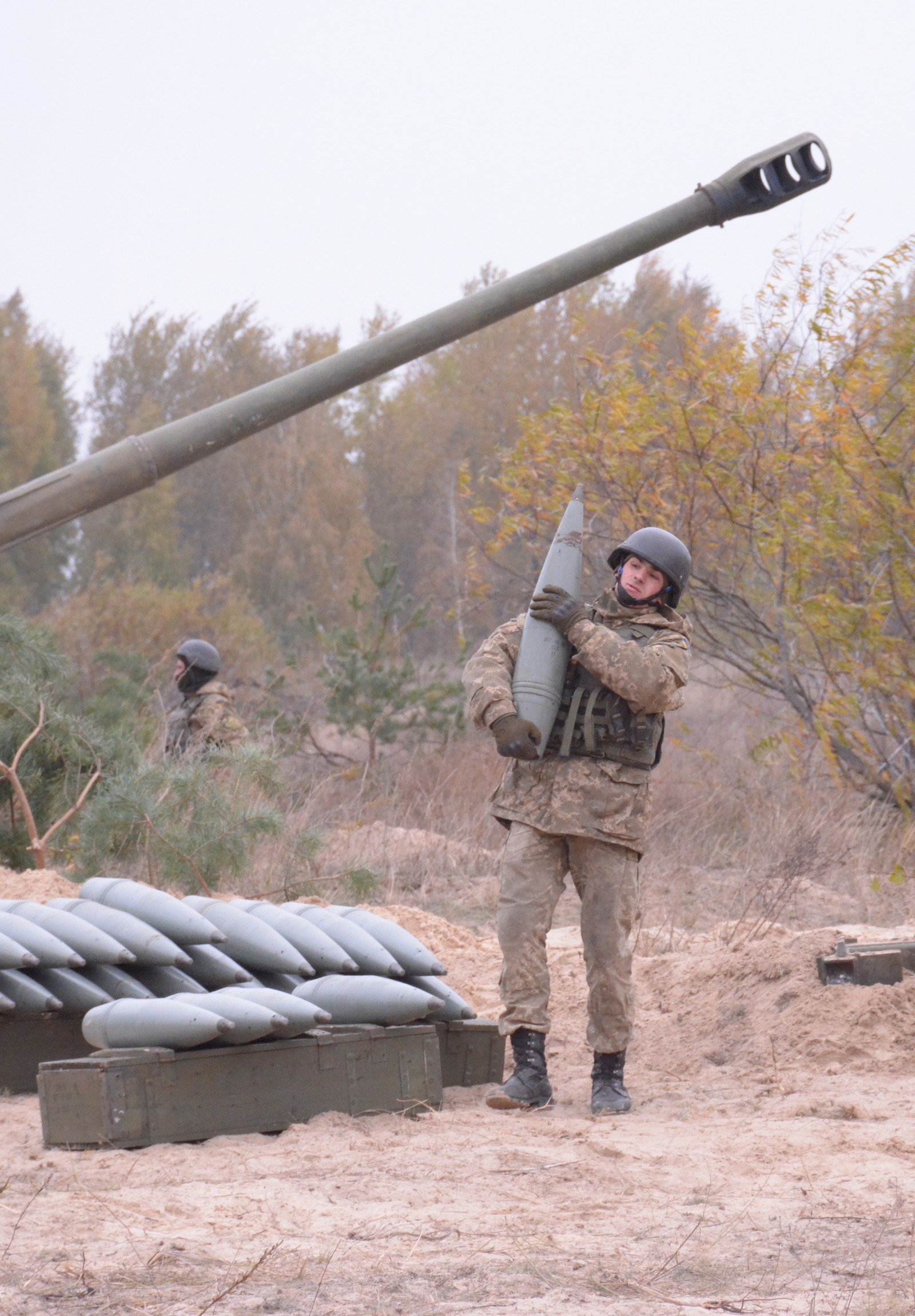 На полігоні “Дівички”, що на Київщині, відбувся практичний етап стратегічних командно-штабних навчань “Рубіж – 2016”. Навчально-бойові завдання виконували артилерійські підрозділи. Гарматні та самохідні дивізіони та батареї відпрацювали вогневі вправи зі знищення різних цілей. Проведення бойових стрільб дозволило підвищити рівень управління частинами і підрозділами, злагодженість артилерійських підрозділів та індивідуальну професійну майстерність військовослужбовців.